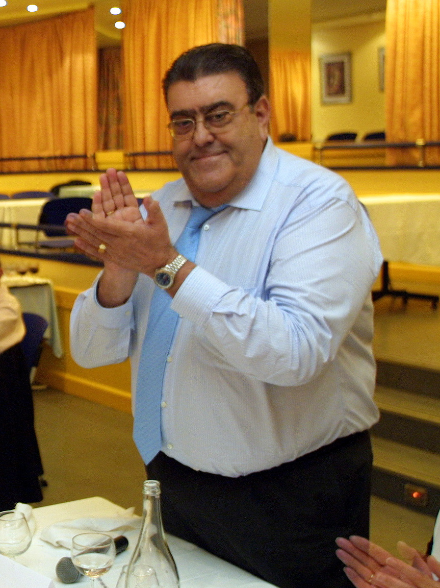 Al acto asistieron el actual titular de Ganadería y otros representantes del Gobierno, los ayuntamientos y las organizaciones sociales.